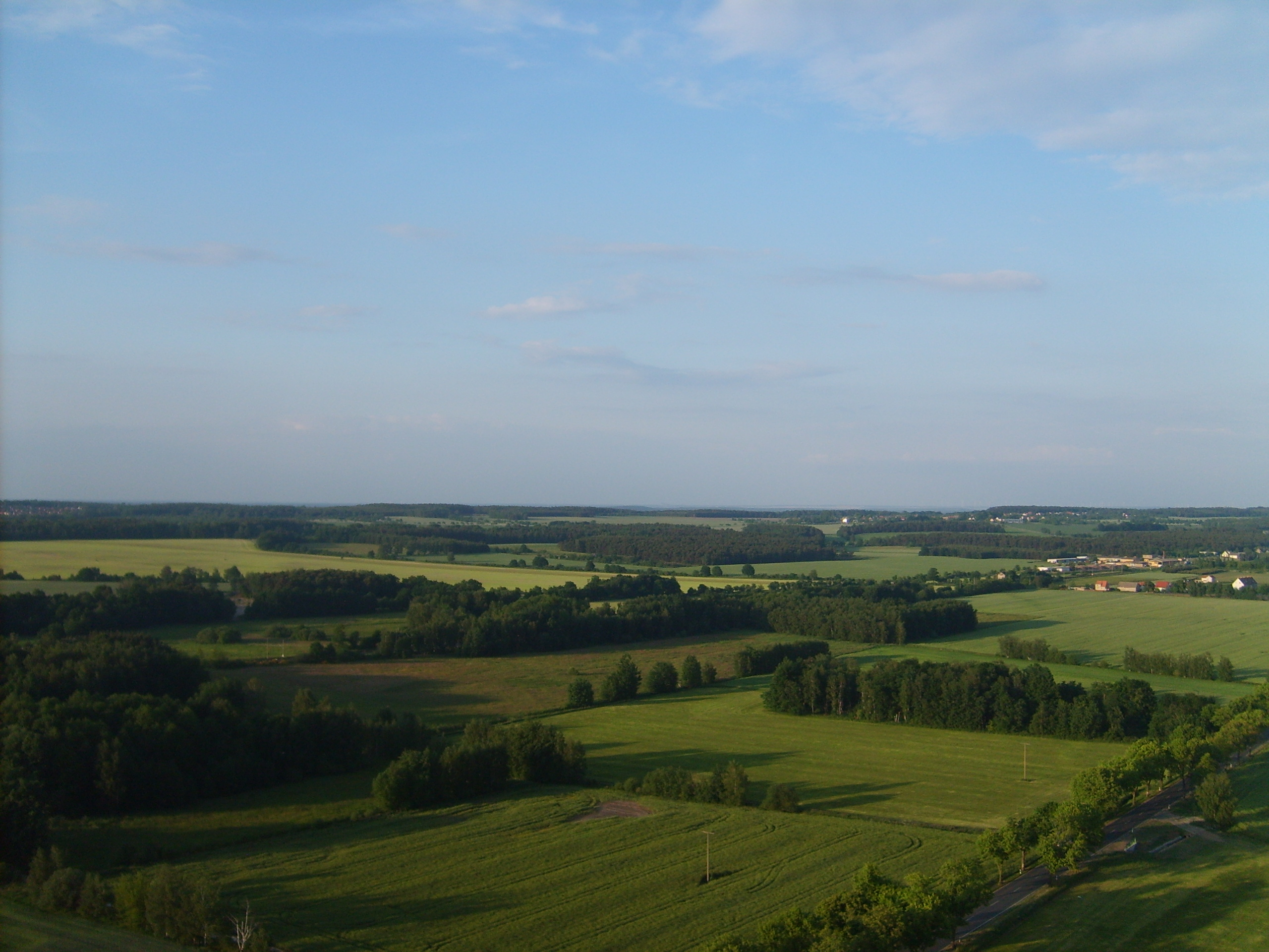 Das Gebiet westlich von Kahla (Brandenburg) aus der Luft.